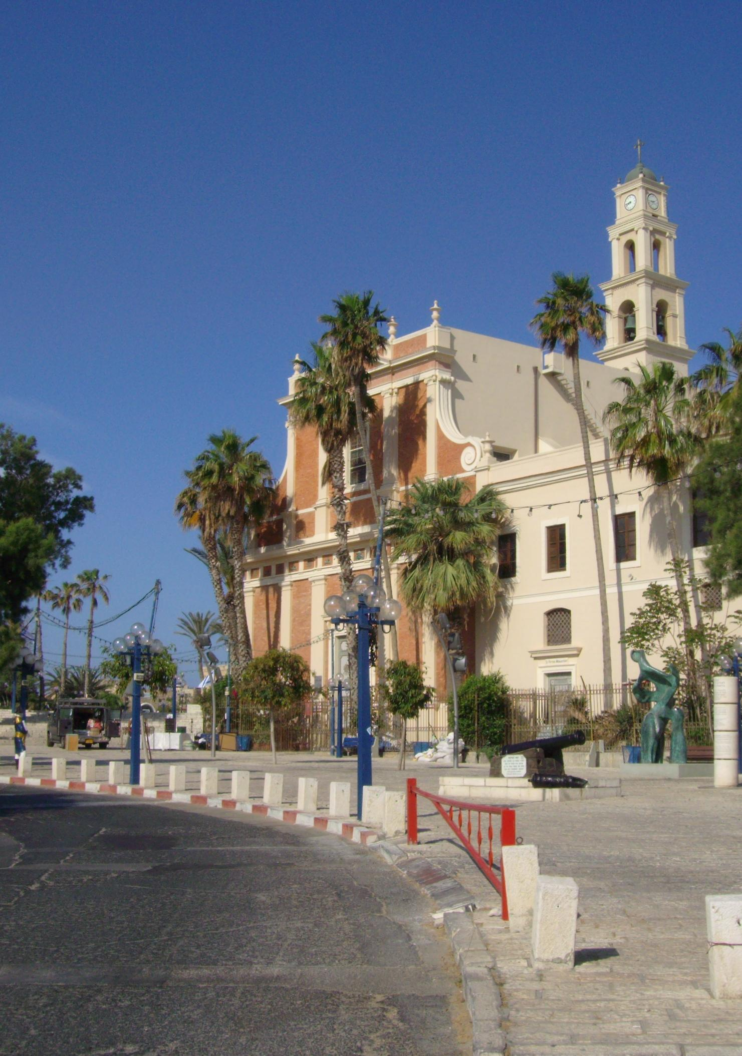 Die Kirche St. Peter in Tel Aviv-Jaffa, aufgenommen am Morgen des 27. April 2009.